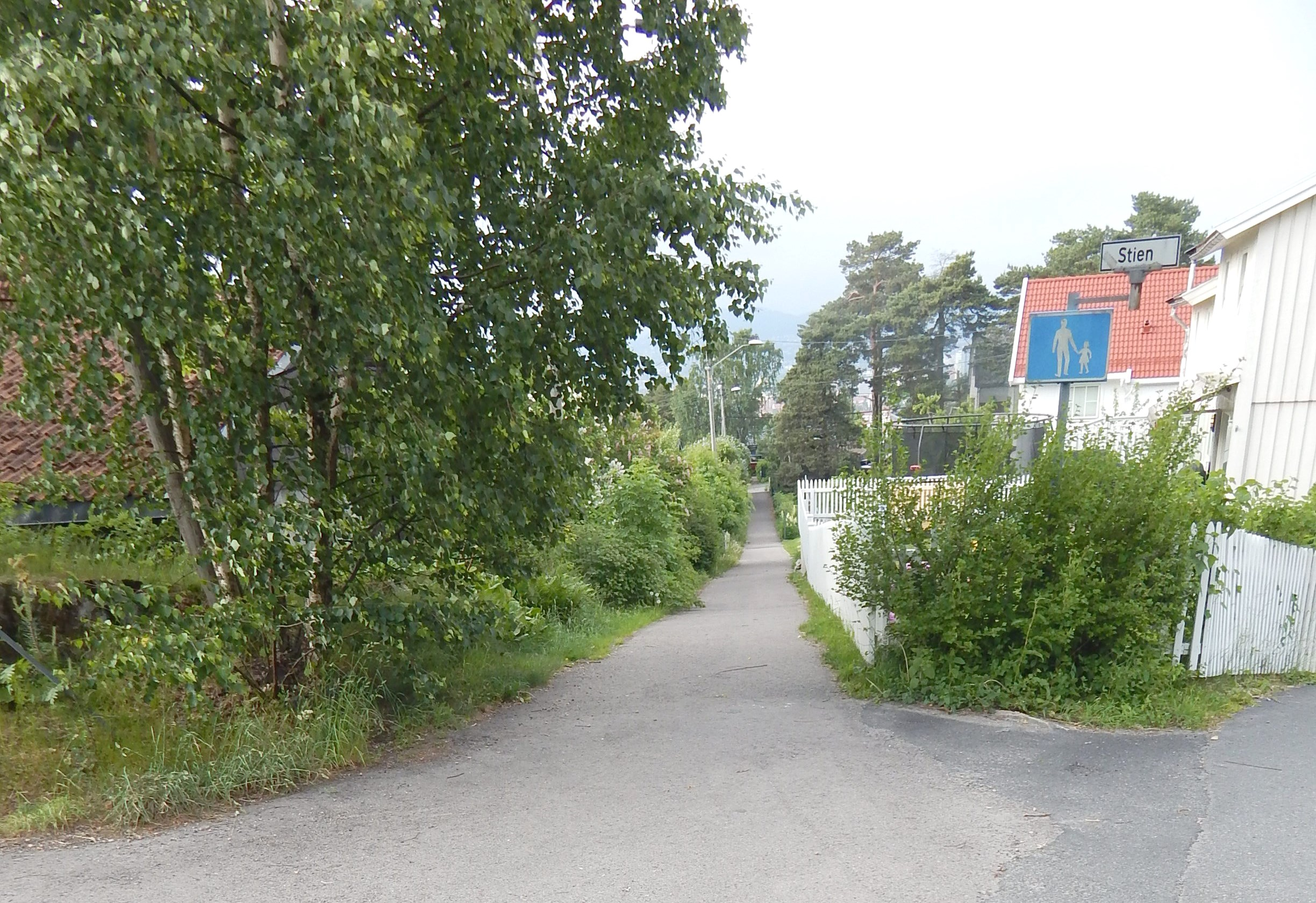 Stien sett fra Vardeveien